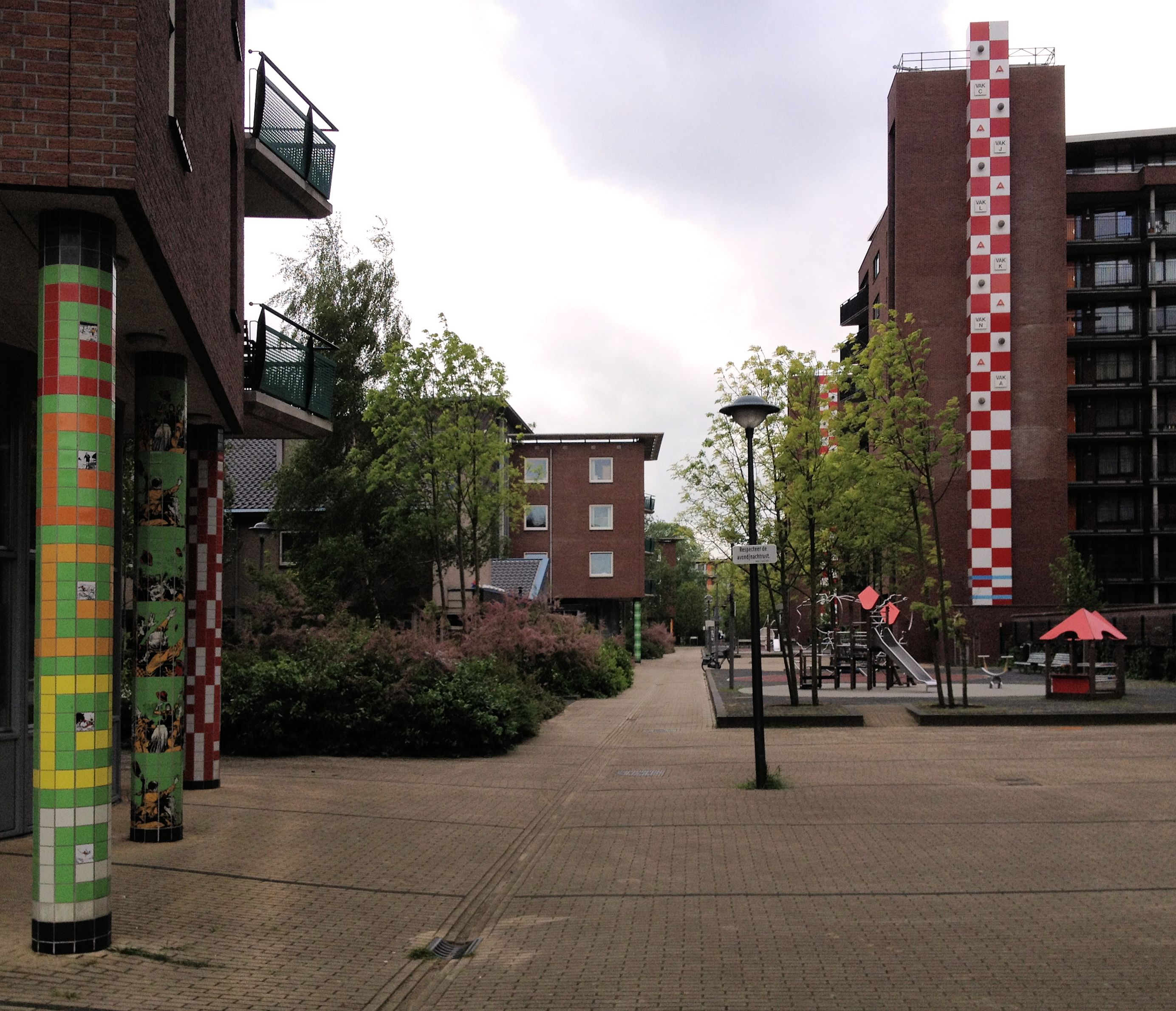 Esplanade de Meer in Park de Meer, met kunstwerken van David Mach en Harold Vugt die verwijzen naar het verleden toen hier het Ajax stadion was gesitueerd.